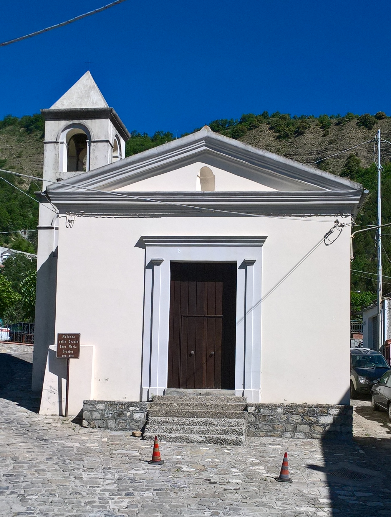 Kirche Madonna delle Grazie in San Costantino Albanese, Potenza, Kalabrien aus dem 17. Jahrhundert